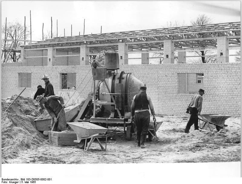 Ragow, Bau eines Rindermaststall Zentralbild Krueger 5.5.1965 Für rund 160.000 MDN wird zur Zeit in der Landwirtschaftlichen Produktionsgenossenschaft "Immer Bereit" in Ragow, Kreis Königs-Wusterhausen ein Bullenmaststall gebaut. Nach seiner Ferigstellung am 31. Mai 1965 sollen darin 150 Mastbullen Platz finden. Die Kollegen des ZBO-Landbau Prieros bereiten die Betonmischung auf.